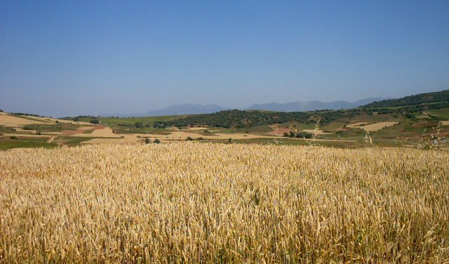 Paisaje y Campos de Cereal en Ventosa (La Rioja). España